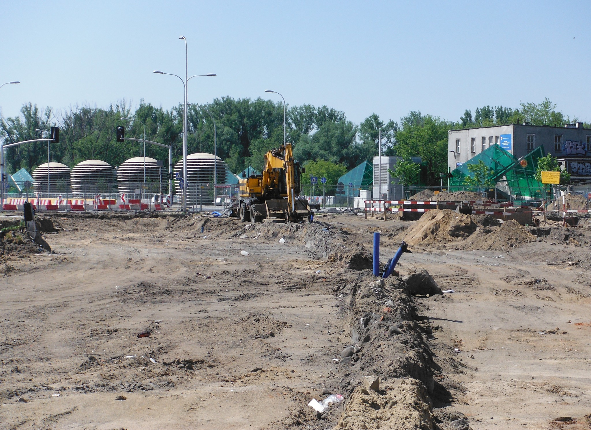 Budowa Trasy Świętokrzyskiej w Warszawie (odcinek Zamoyskiego-Targowa).